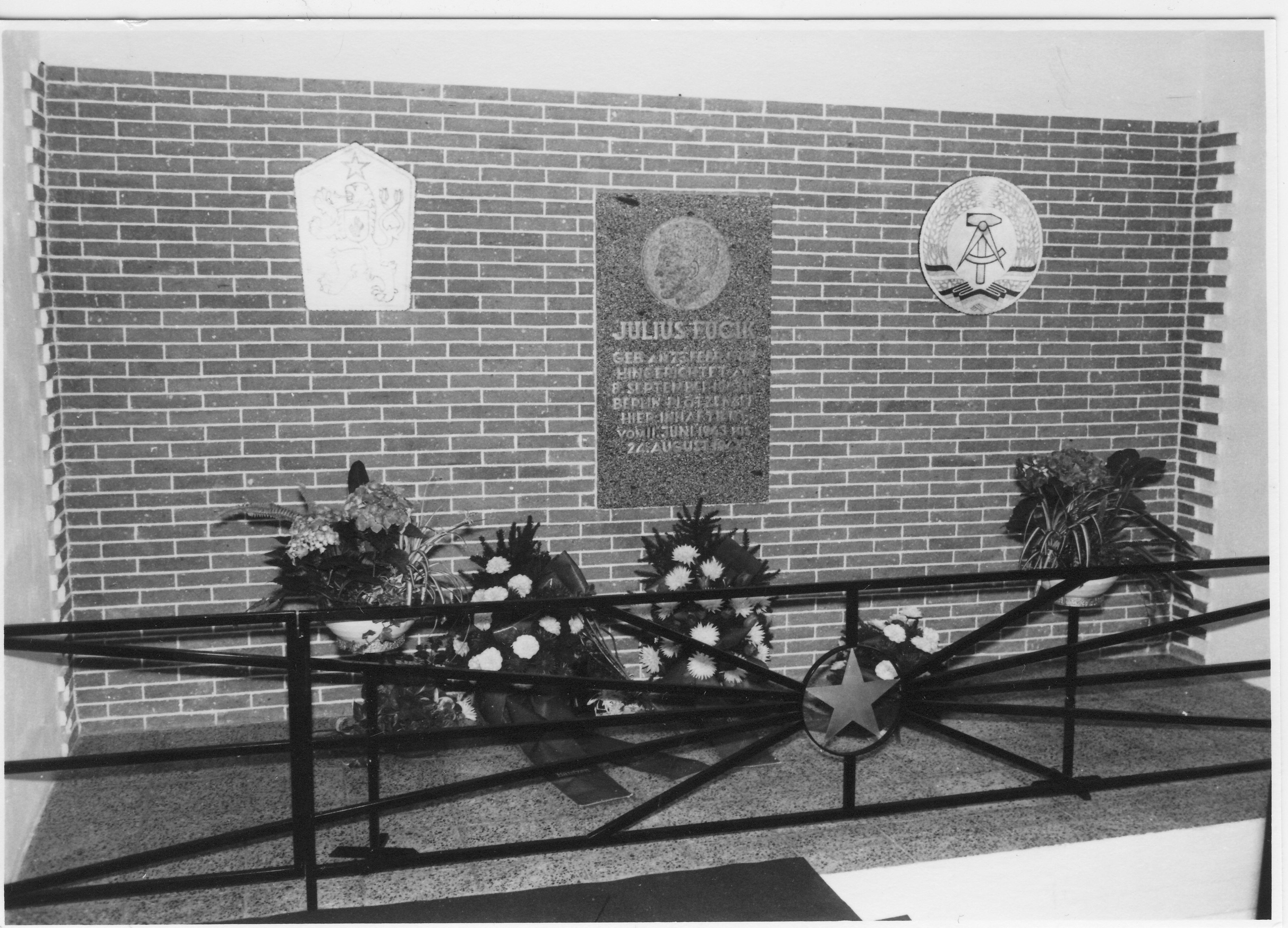 Fucik-Gedenkbereich in Bautzen II, 1979